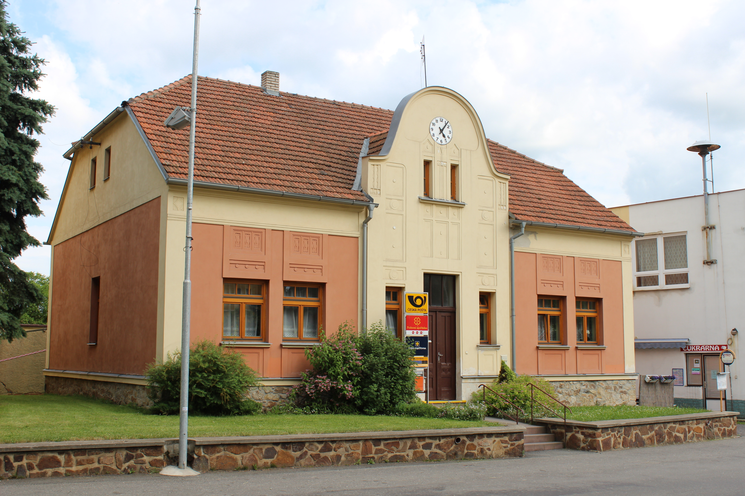 Budova poštovního úřadu v Pavlíkově (dům číslo popisné 106).